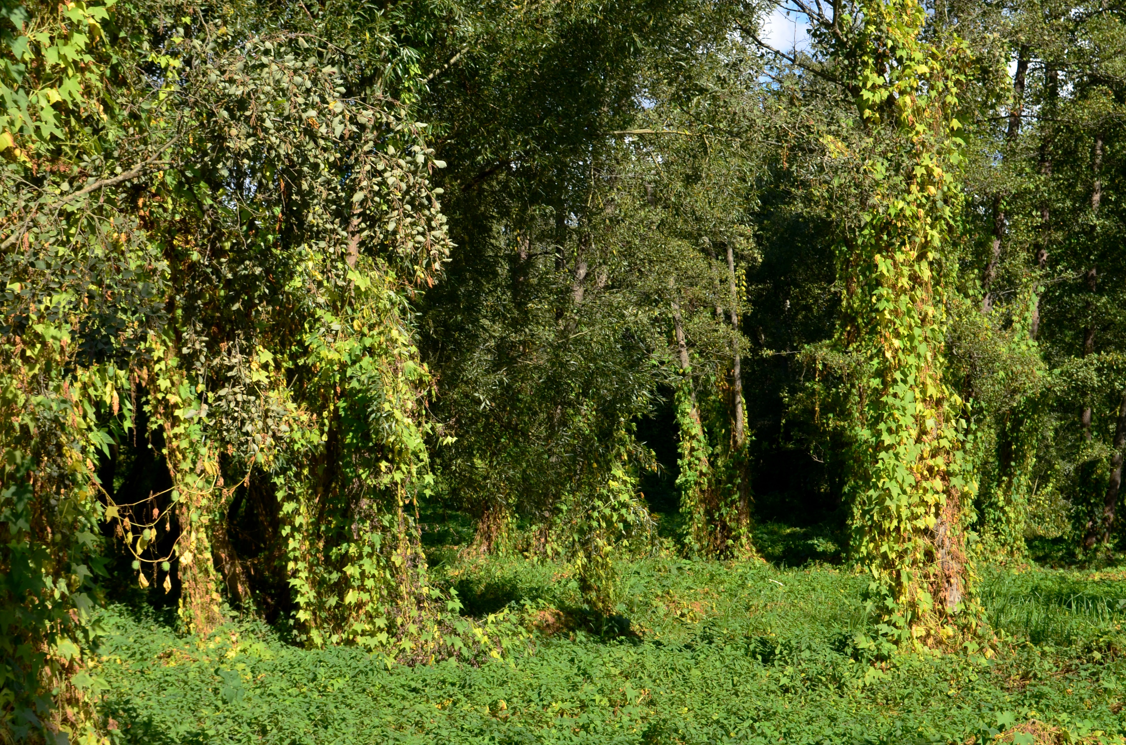 Žemaitėška: Apīnē, apsivīniuoji Žalgėrė medės medžius, Šėlotės rajuons